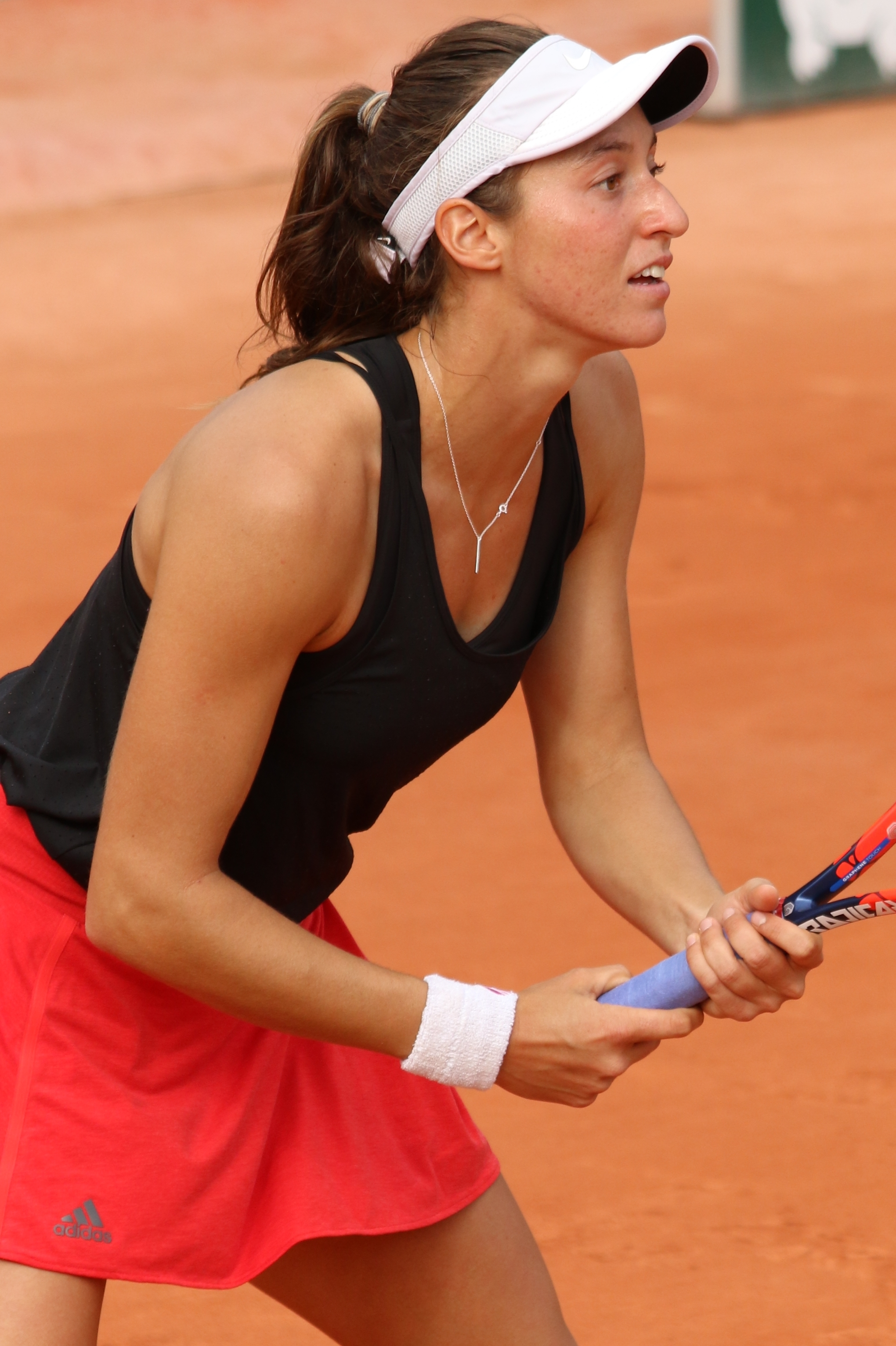 Stefani RG19 (5)